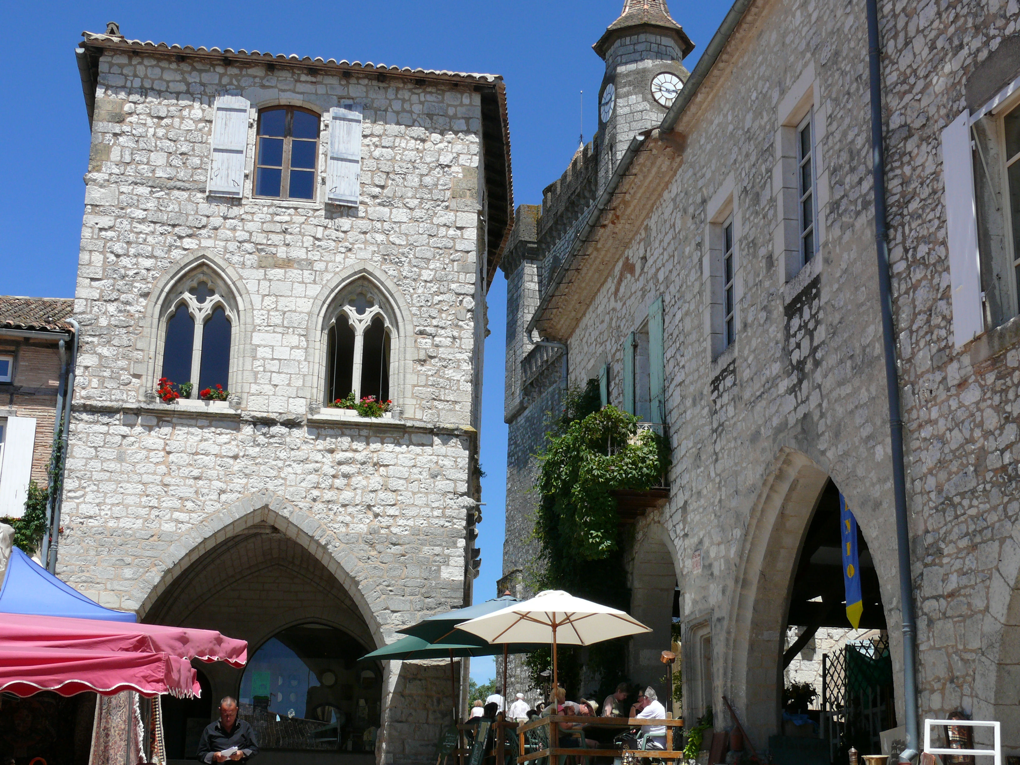 Monflanquin - Maison dite du Prince Noir et la place Foch